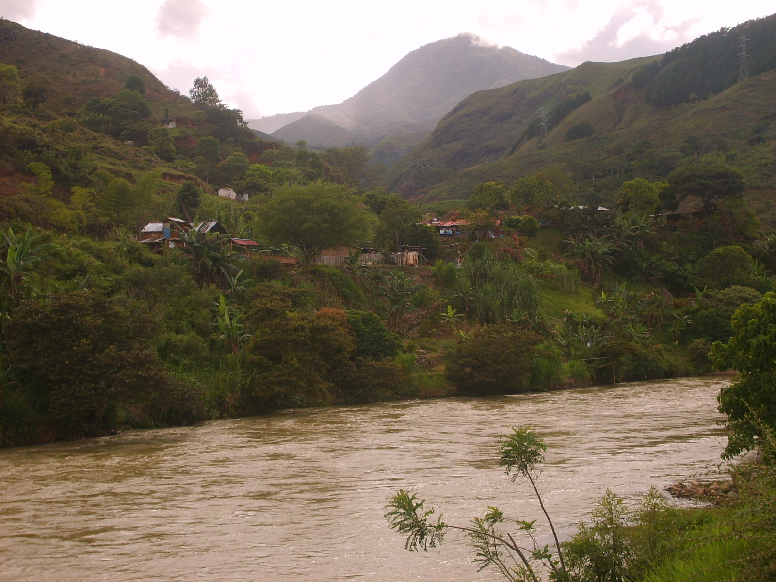 Rio de Suarez